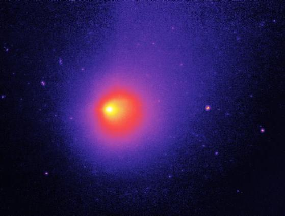 Comet 29P/Schwassmann-Wachmann (Schwassmann-Wachmann 1) by Spitzer Space Telescope (SST)